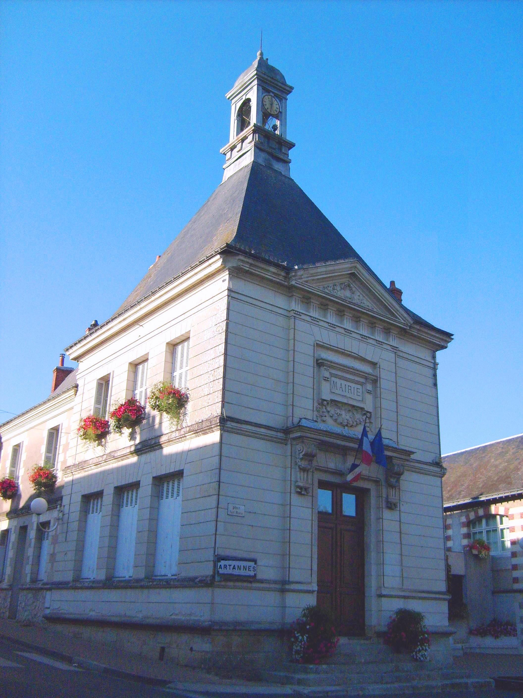 Mairie d'artannes/Indre